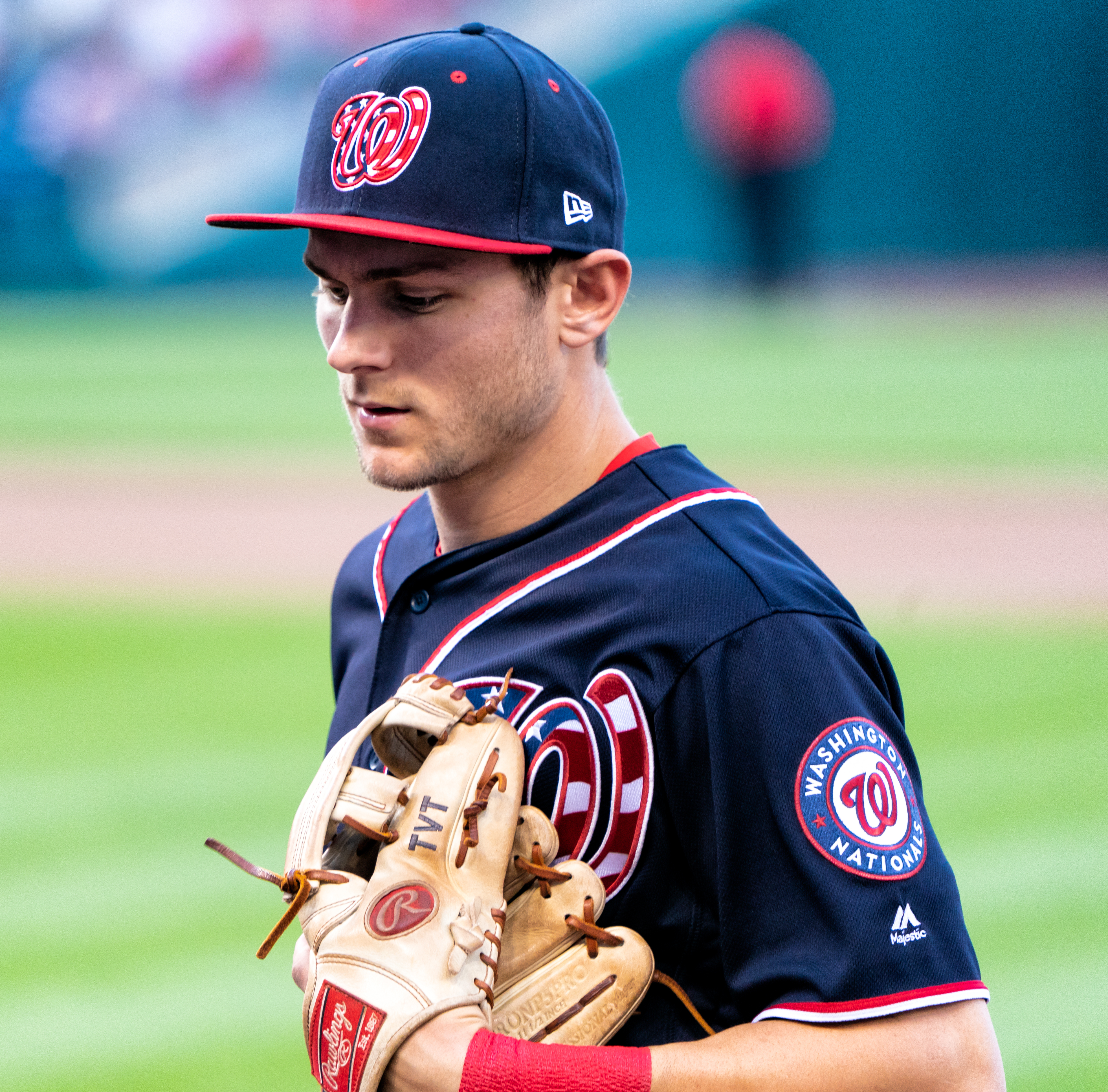 トレア・ターナー